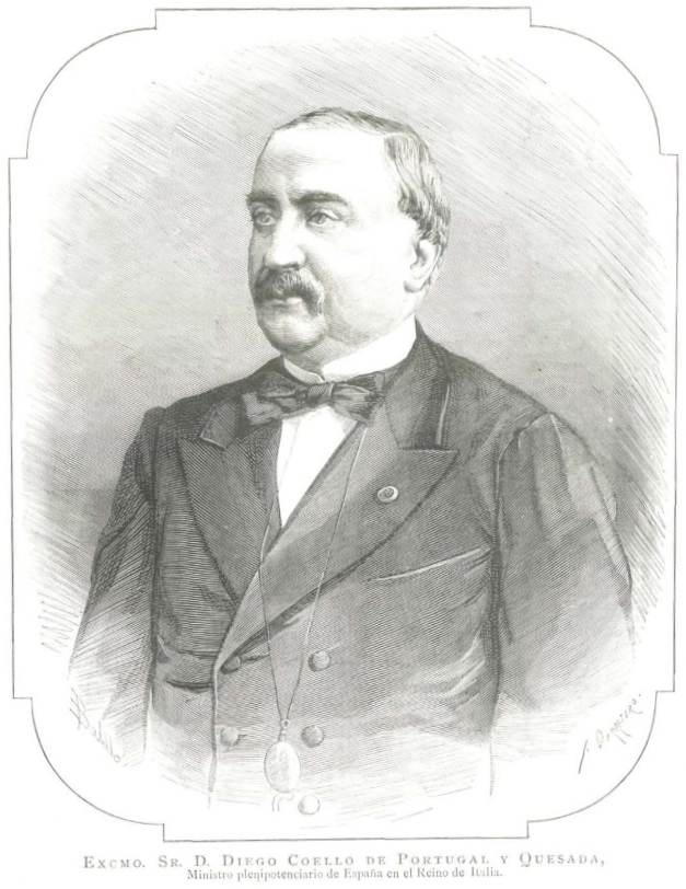 Diego Coello de Portugal y Quesada, ministor plenipotenciario de España en el Reino de Italia.